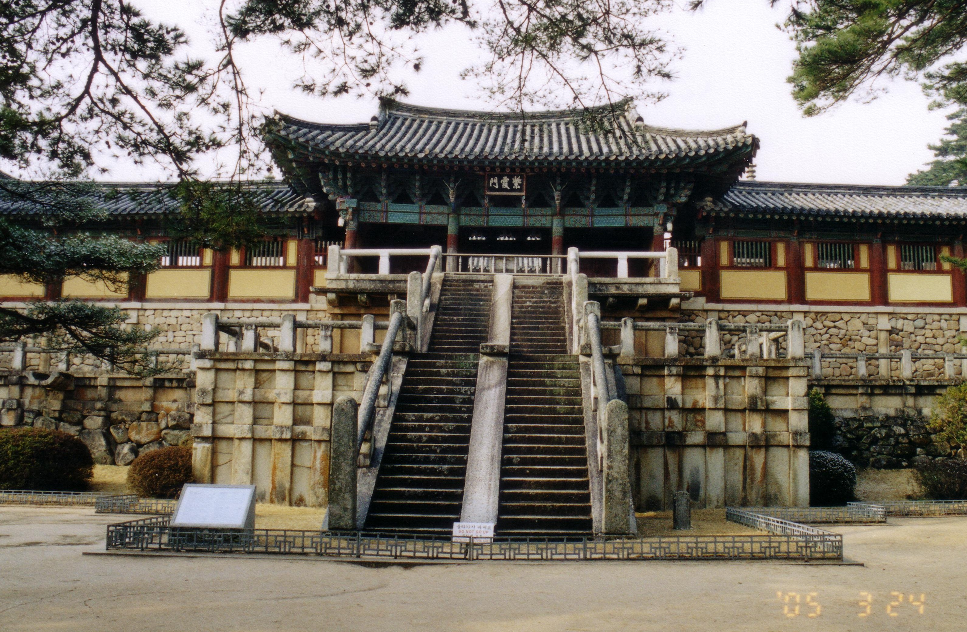 Cheongungyo und Baegungyo im Bulguksa